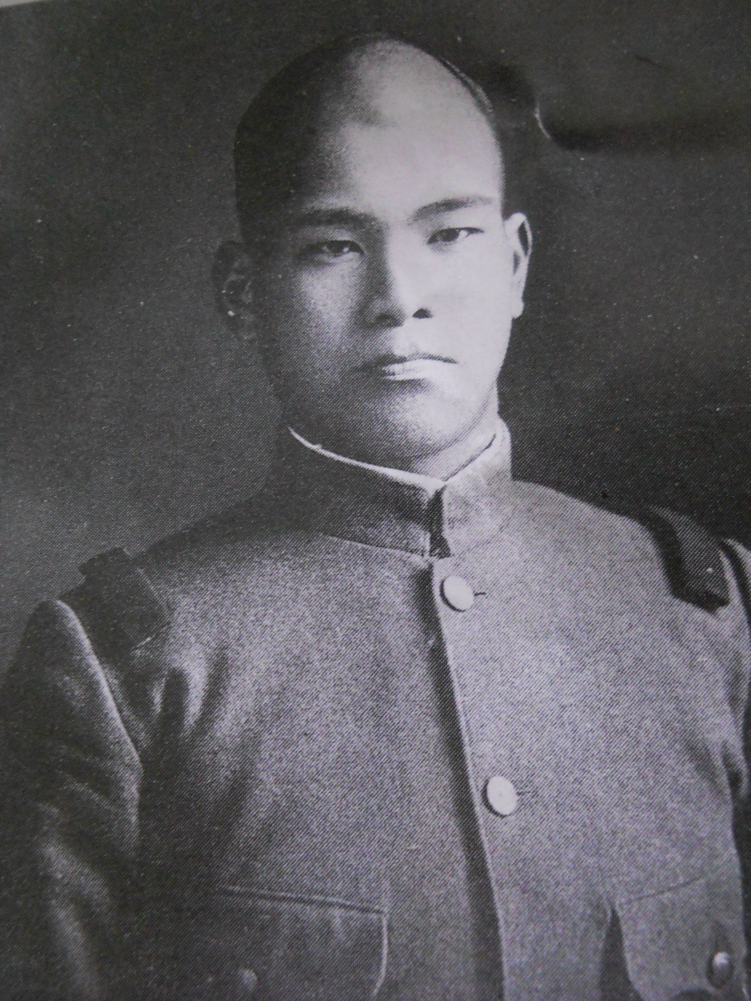 Mitsugi Nishida